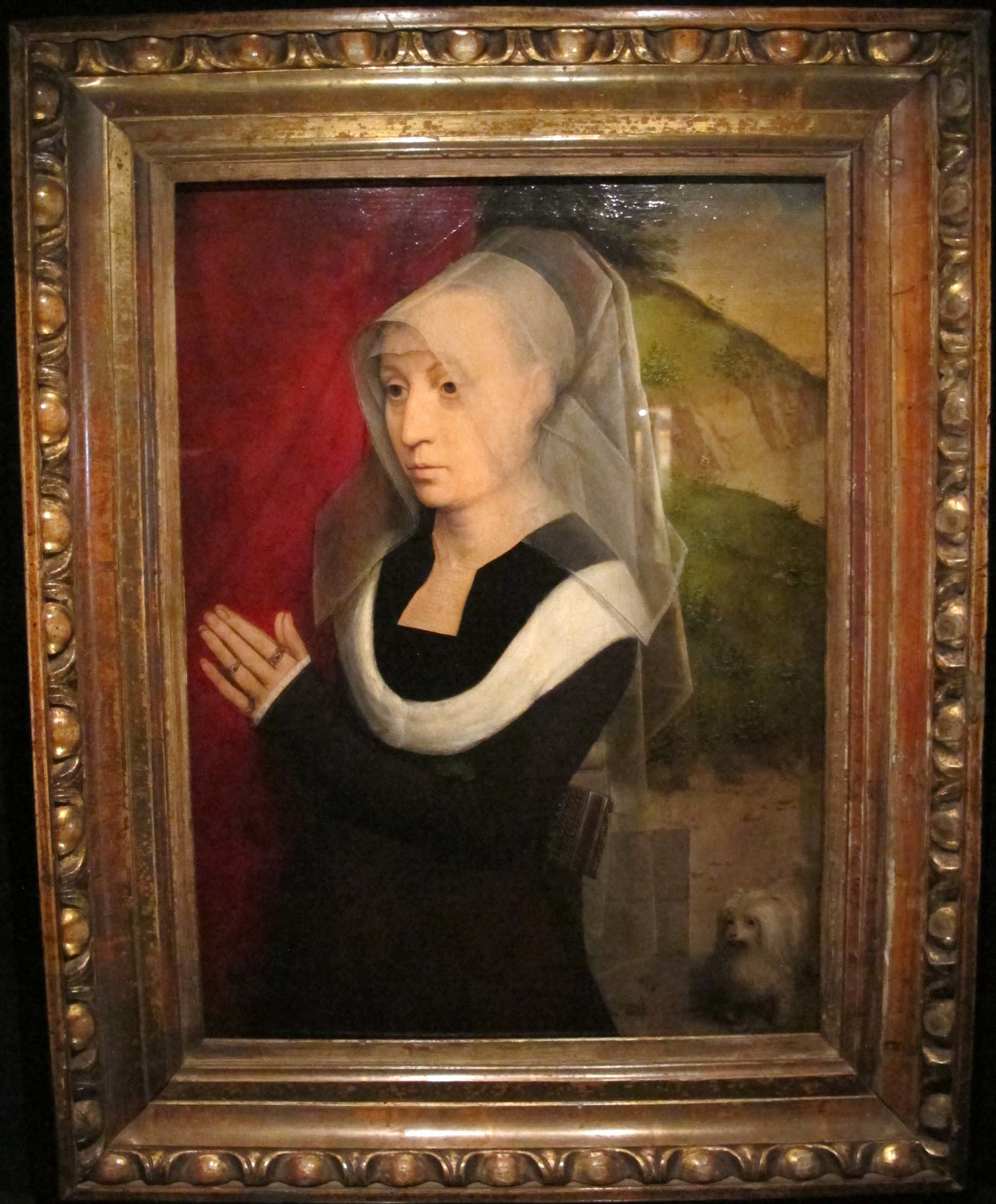 Hans memling, ritratto di donna orante